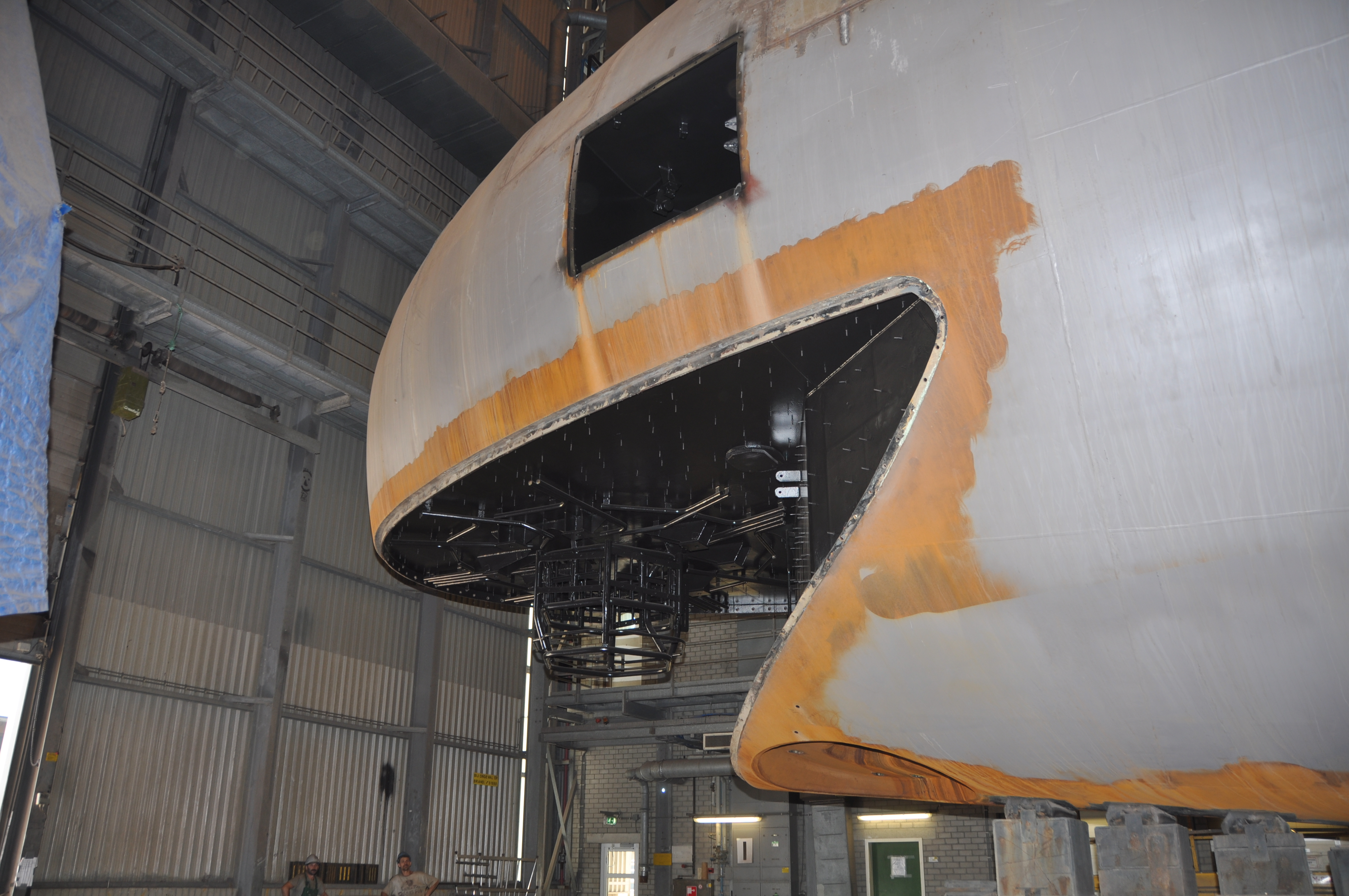 De Zr.Ms. Zeeleeuw in onderhoud.